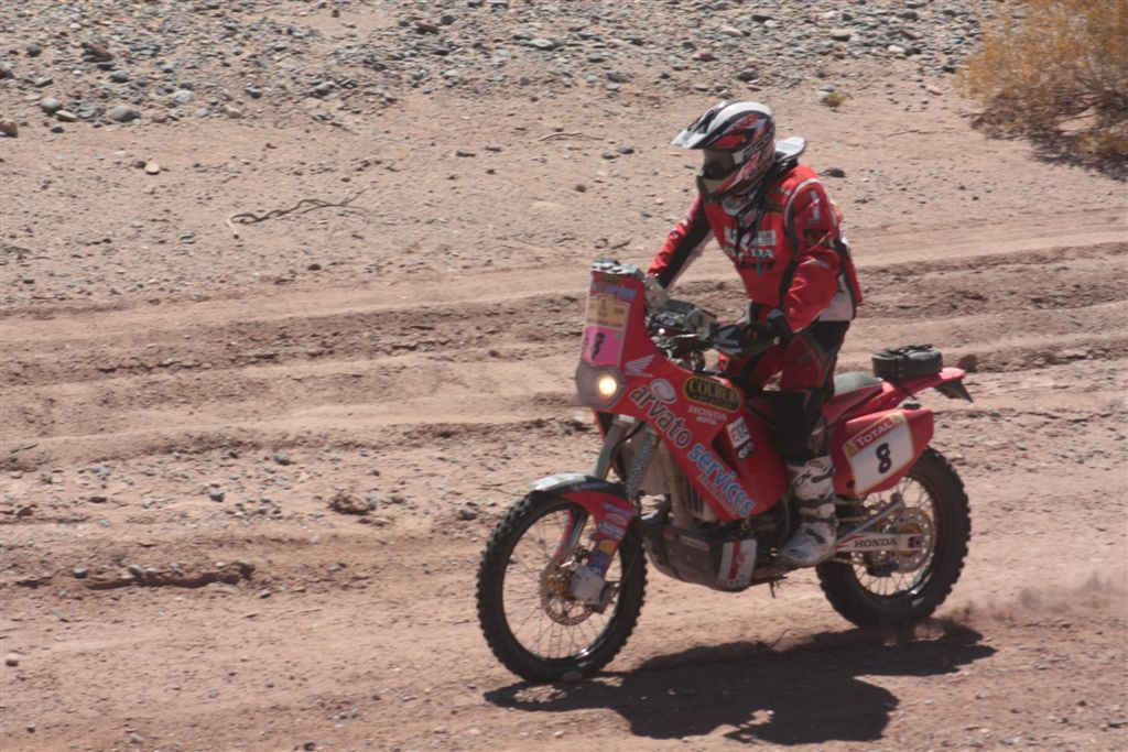 Rally Dakar 2009, etapa 4 Jacobacci Neuquén. El francés Casteu en una KTM